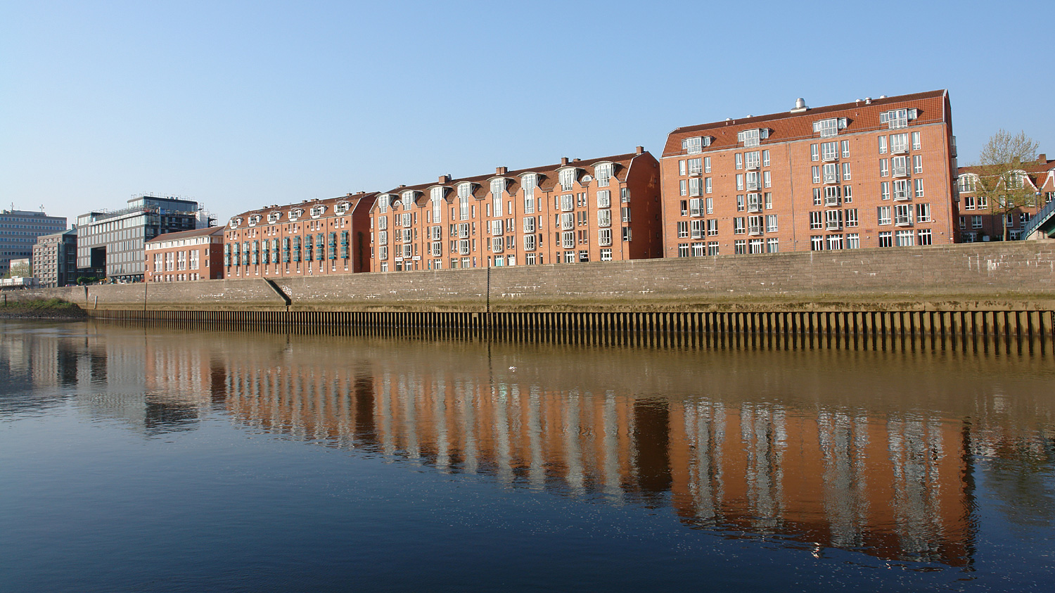 Bremen: Blick von der Schlachte auf den Teerhof. Links das Beluga-Gebäude